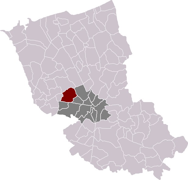 Locatie gemeente Rubroek in arrondissement Duinkerke. Zelfgemaakt. Location of Rubrouck municipality in the arrondissement of Dunkirk. Self made. Localisation de la commune de Rubrouck dans l'arrondissement de Dunkerque. Fait moi-même.